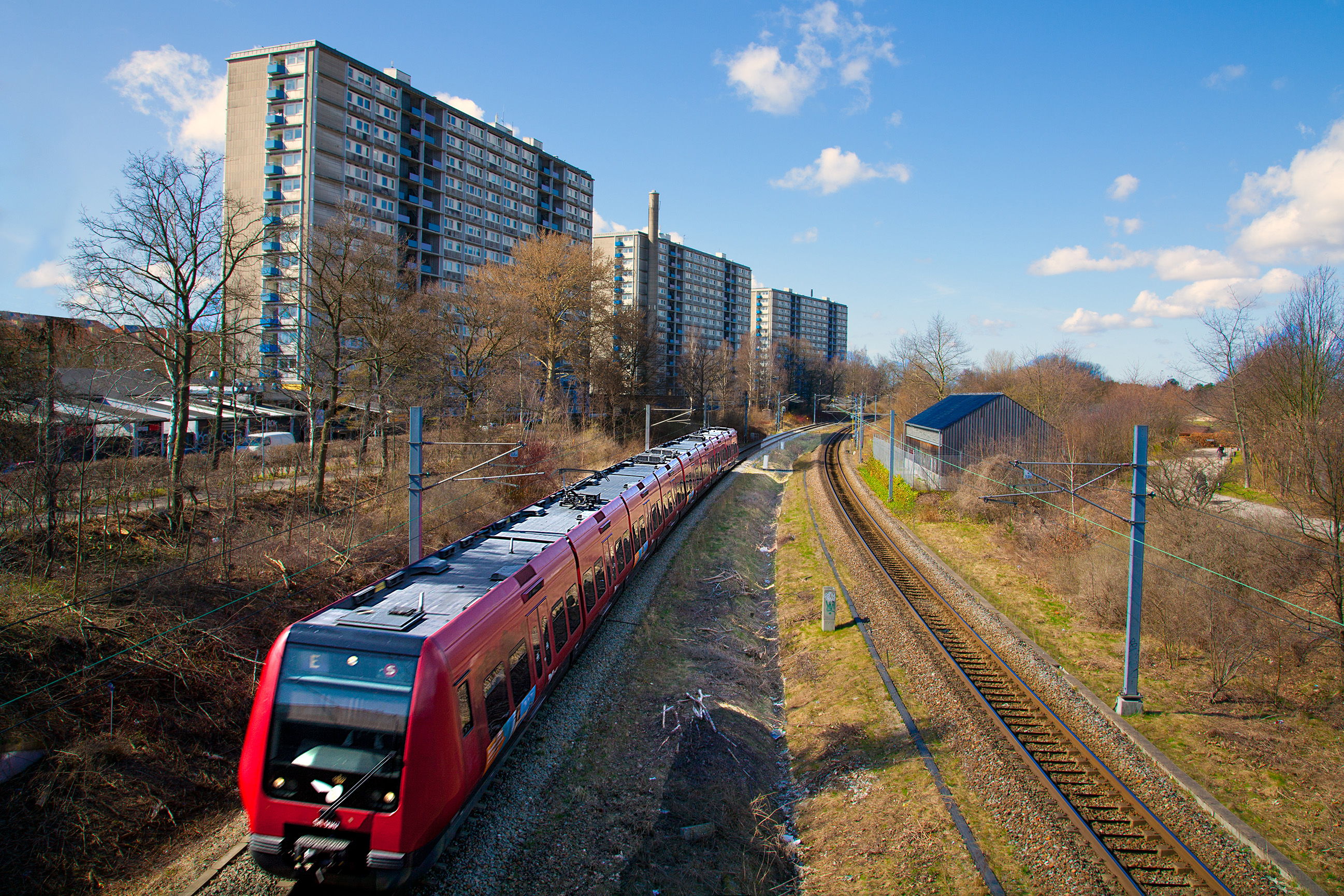 3 højhuse der til sammen udgør "Sorgefrivang II". Nederst ses et S-tog